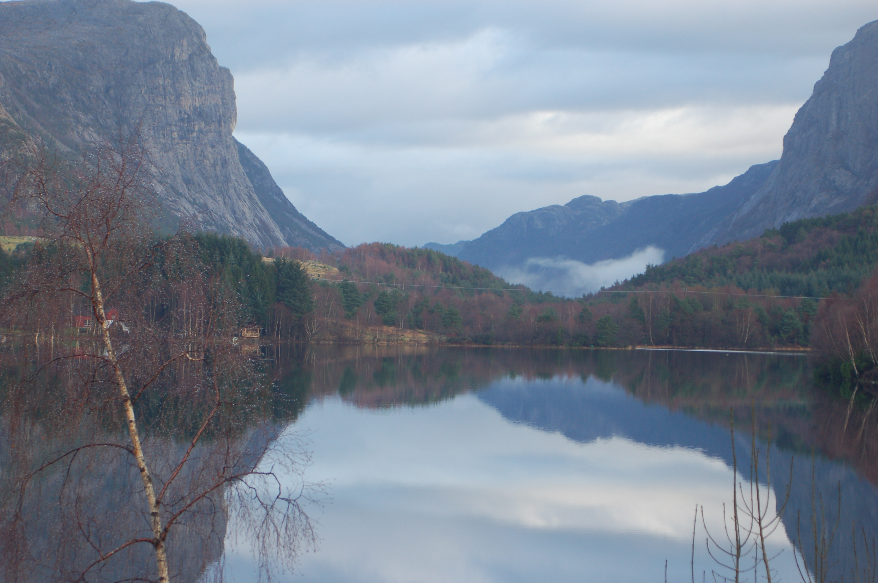 Bjørheimsvatnet, Strand, Rogaland, Norway